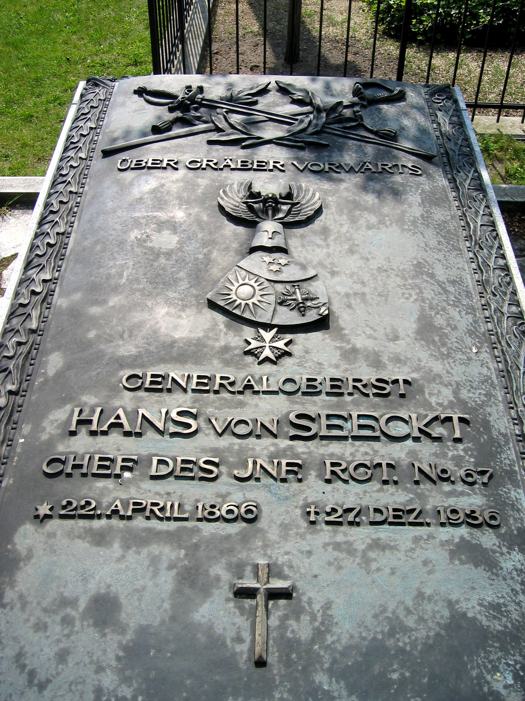 Grabstein für Hans von Seeckt auf dem Invalidenfriedhof in Berlin